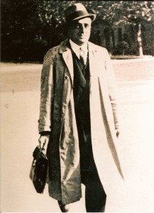 אדוארדו פוקריני